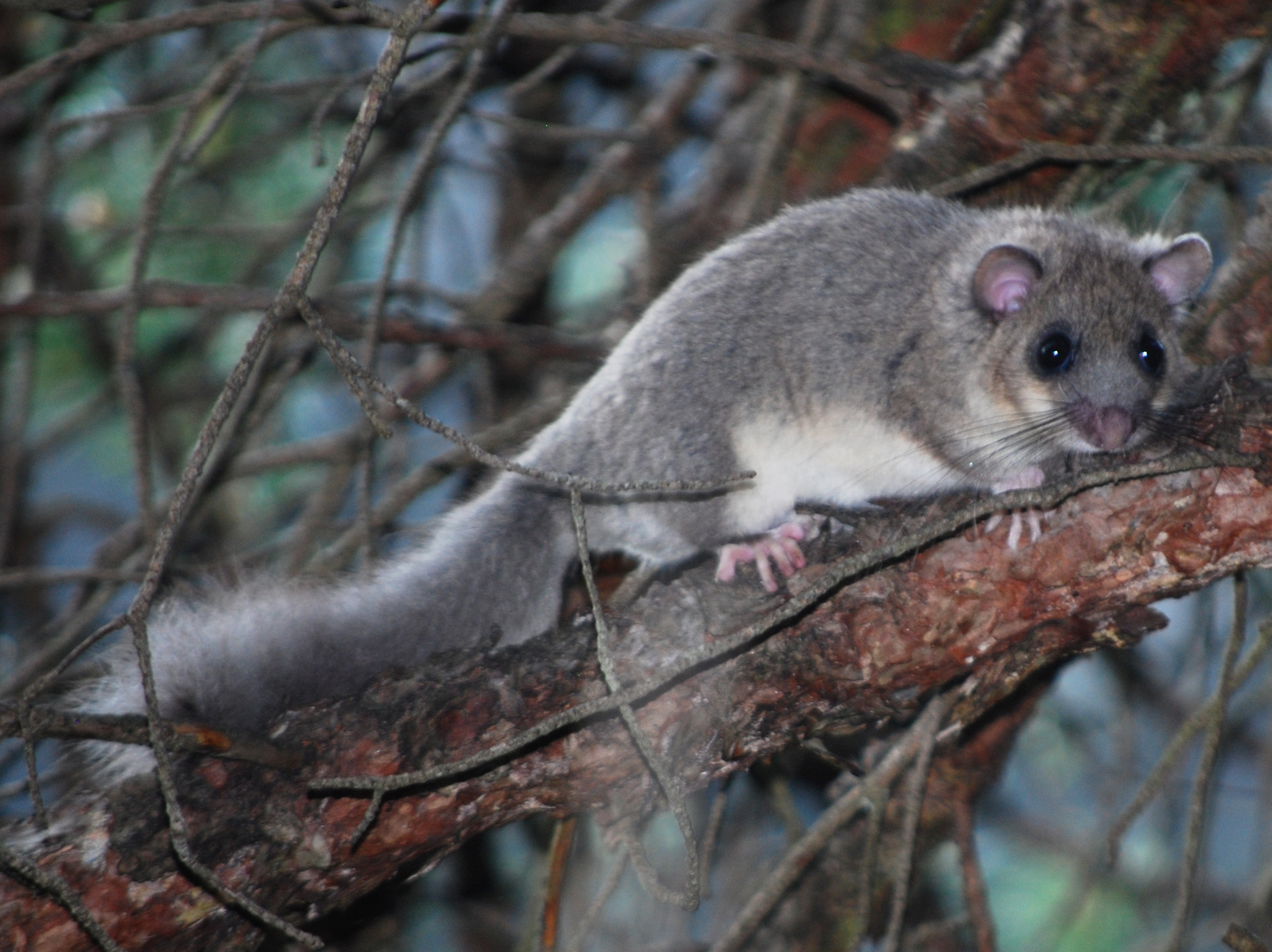 Siebenschläfer auf Baum